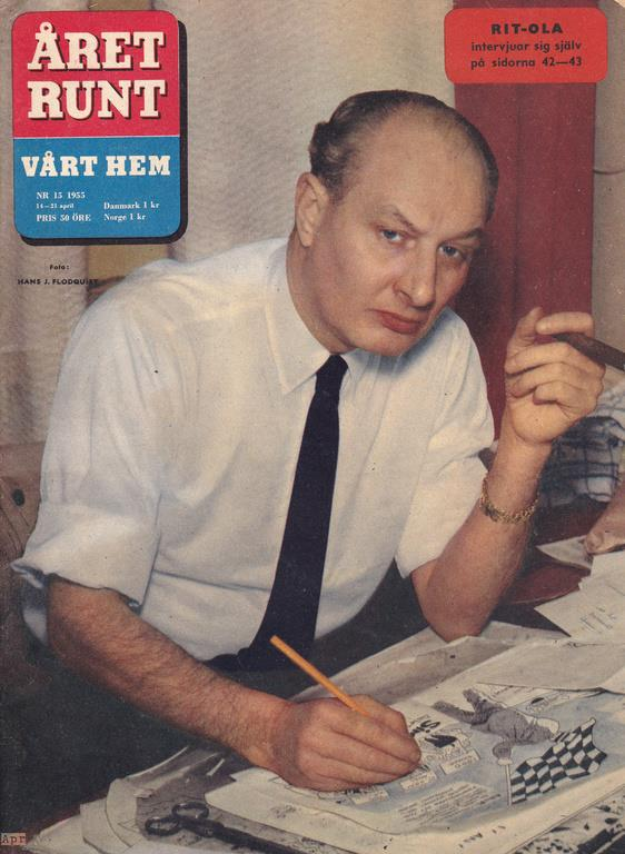 Jan-Erik Garland (1905–1988).